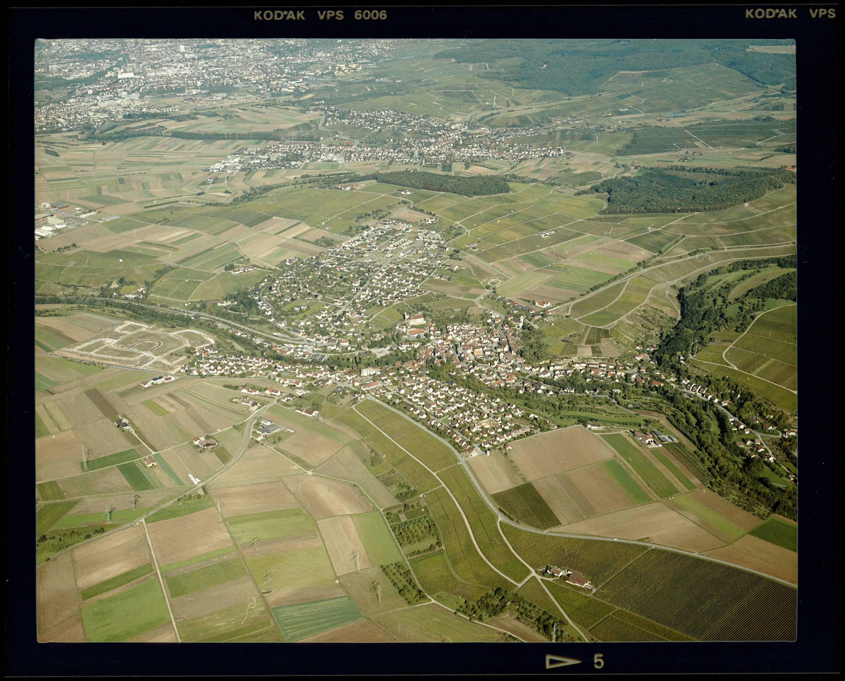 Luftbild von Talheim - Staatsarchiv Sigmaringen - Archivalieneinheit N 1/96 T 1 Nr. 850